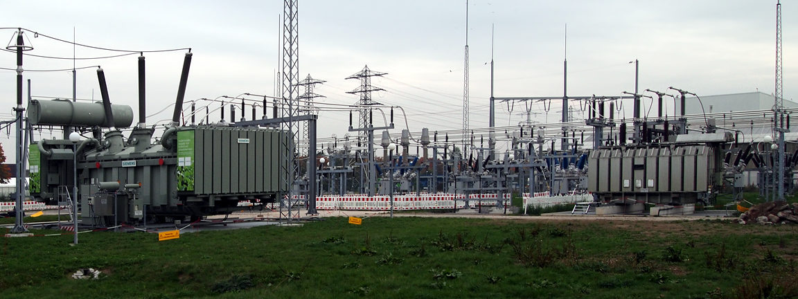 Umspannwerk Kändelweg in Bruchsal, neu errichtet 2013